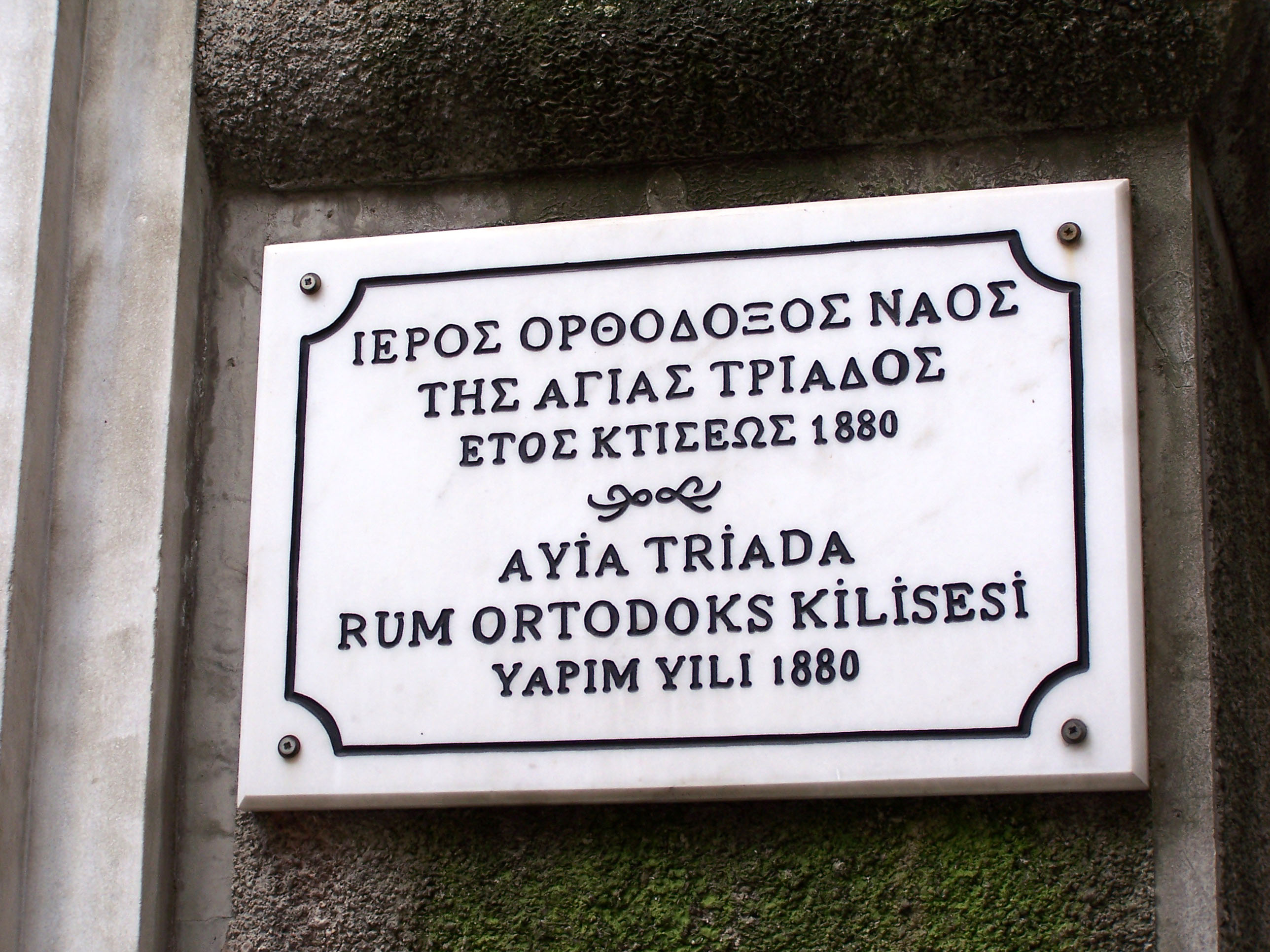 Aya Triada Rum Ortodoks Kilisesi in Beyoğlu, İstanbul, Turkey